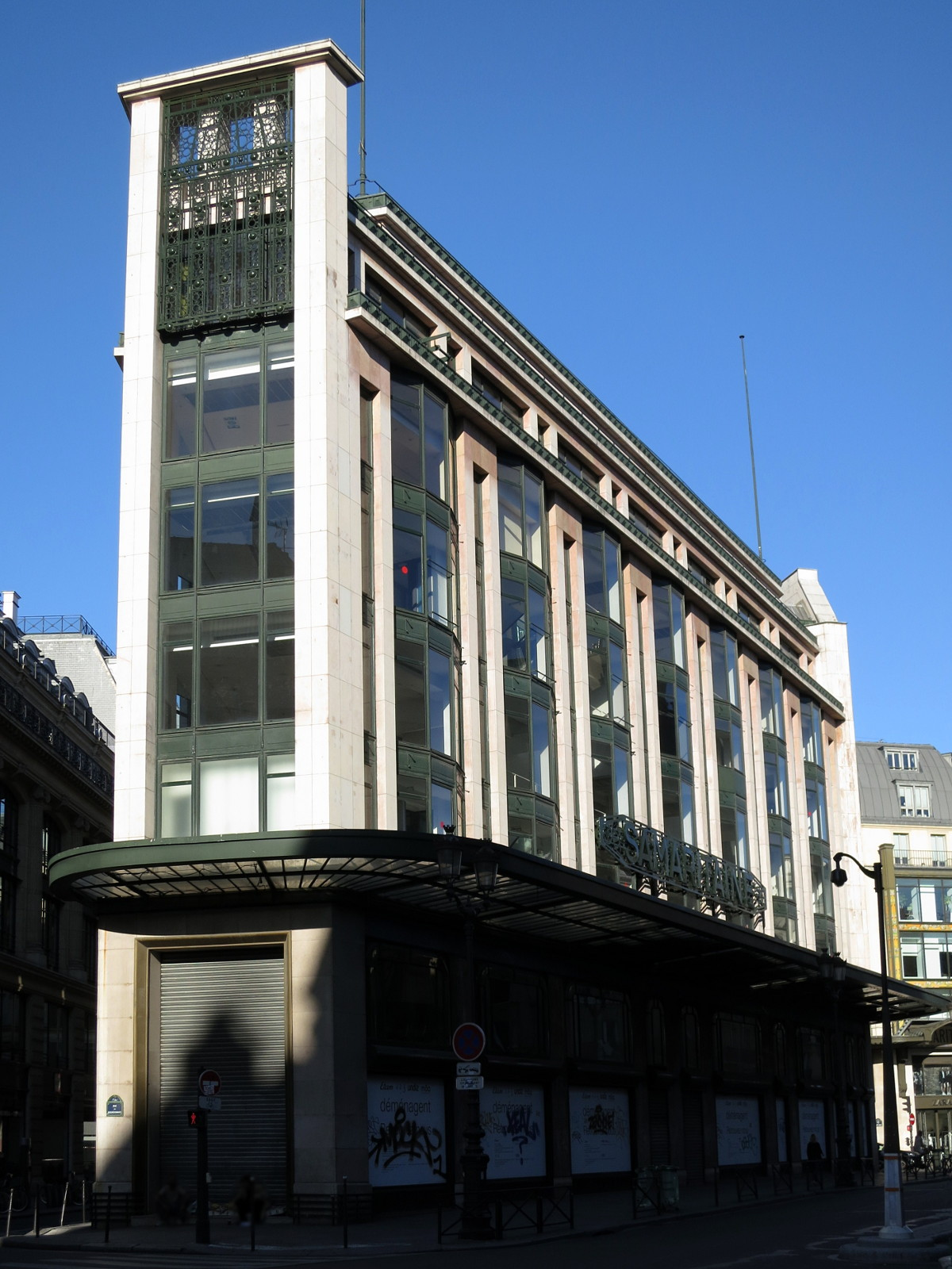 Vue du magasin 3 de la Samaritaine, à l'angle de la rue de Rivoli et de la rue Boucher à Paris